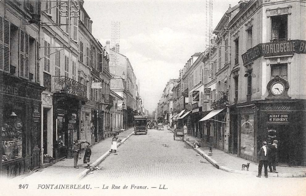 Fontainebleau, rue de France, carte postale ancienne. À droite, sous l'enseigne "Horlogerie" (n° 10 de la rue de France), il y avait une hôtellerie dans les années 1880.